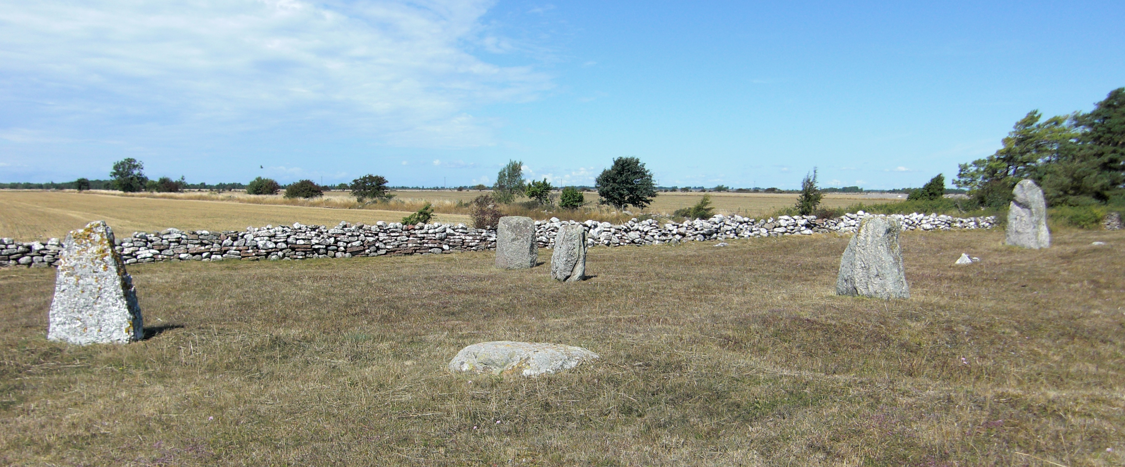 Seby gravfält (Raä-nr Segerstad 24:1) i Segerstads socken, Mörbylånga kommun, Öland, Kalmar län, Sverige.